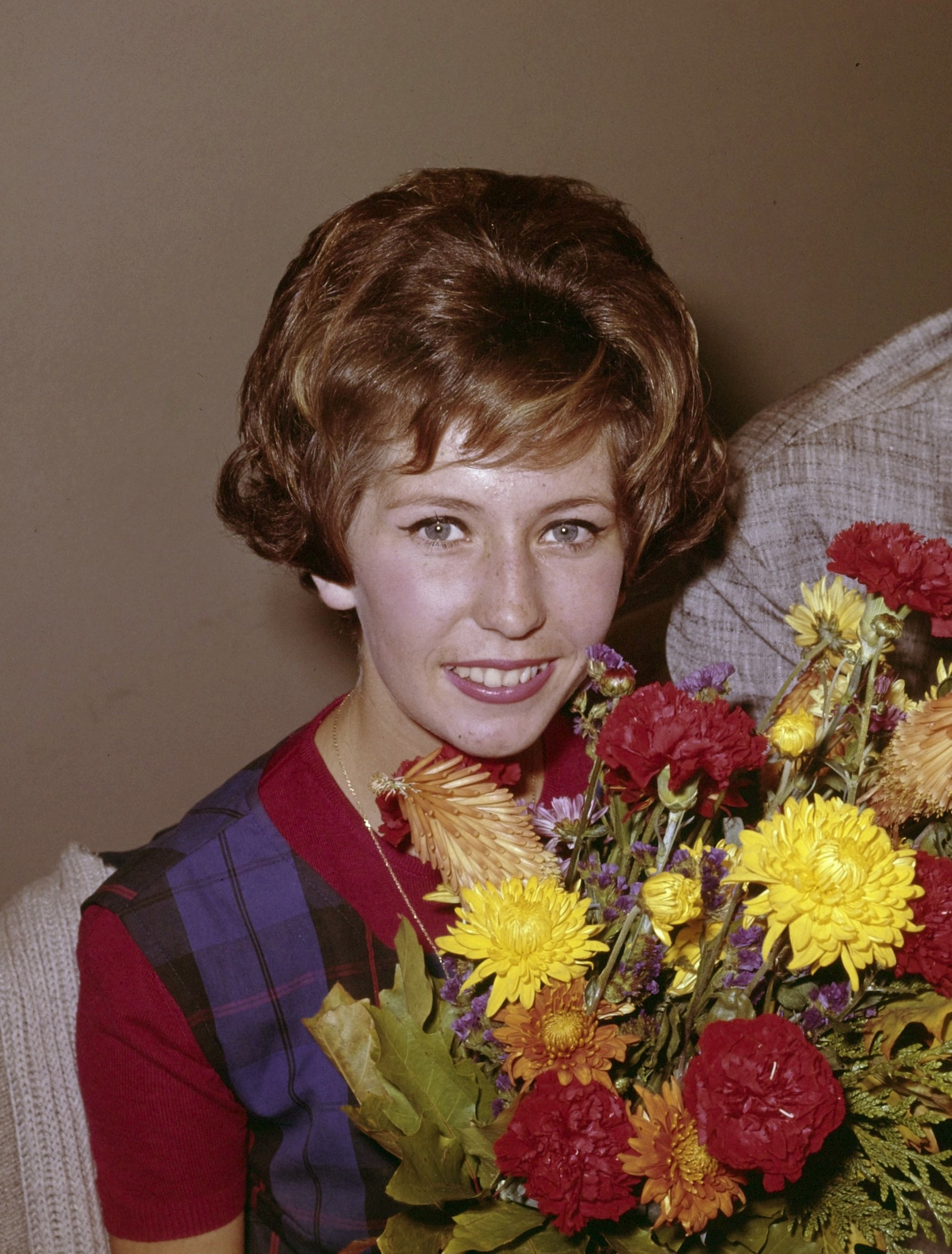 Nederlandse artiesten naar Nederlands Nieuw-Guinea. Willeke Alberti